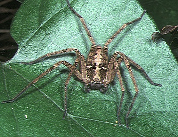 male Sinopoda okinawana from Okinawa.